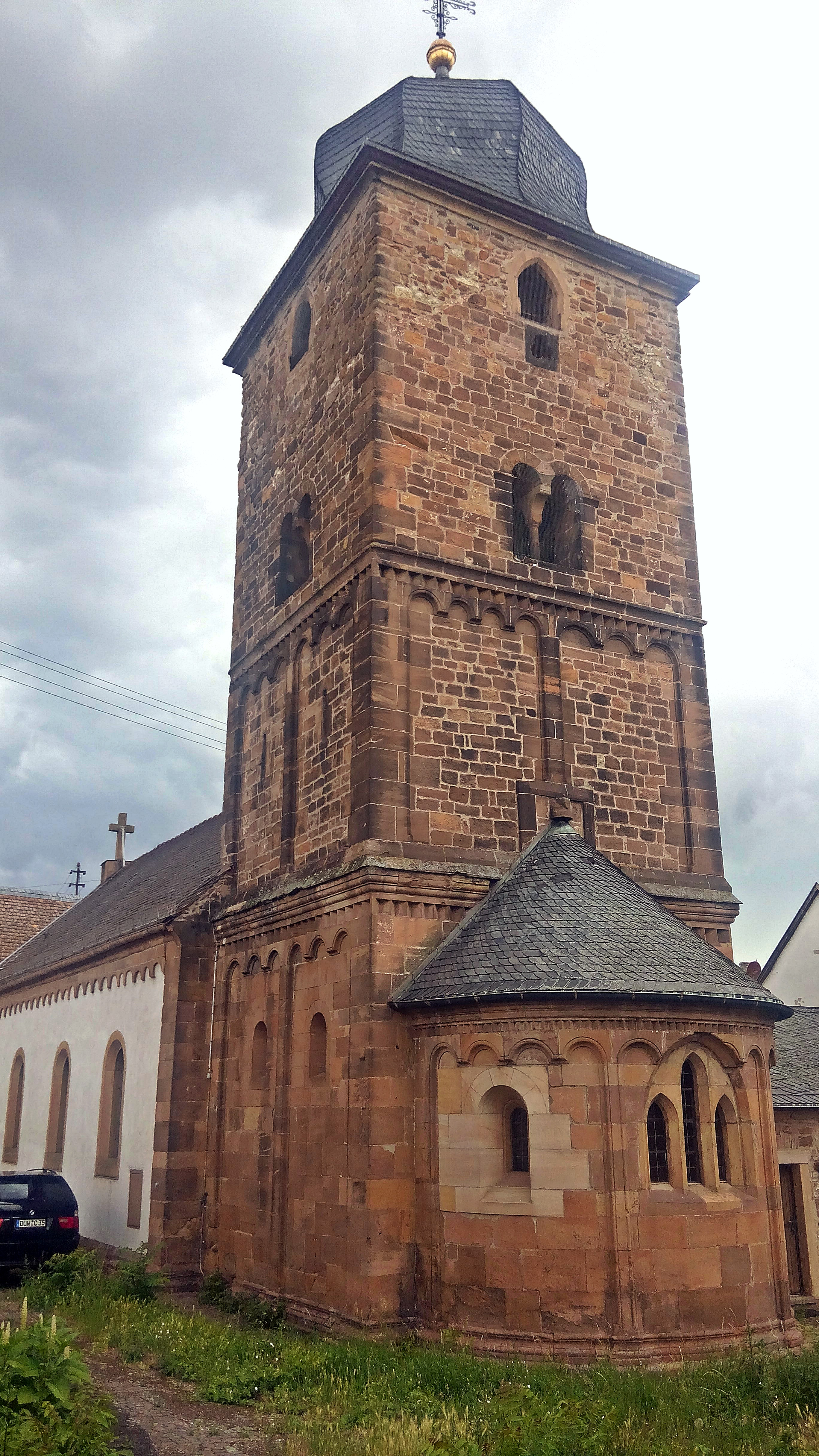 Dackenheim, kath. Kirche von Osten